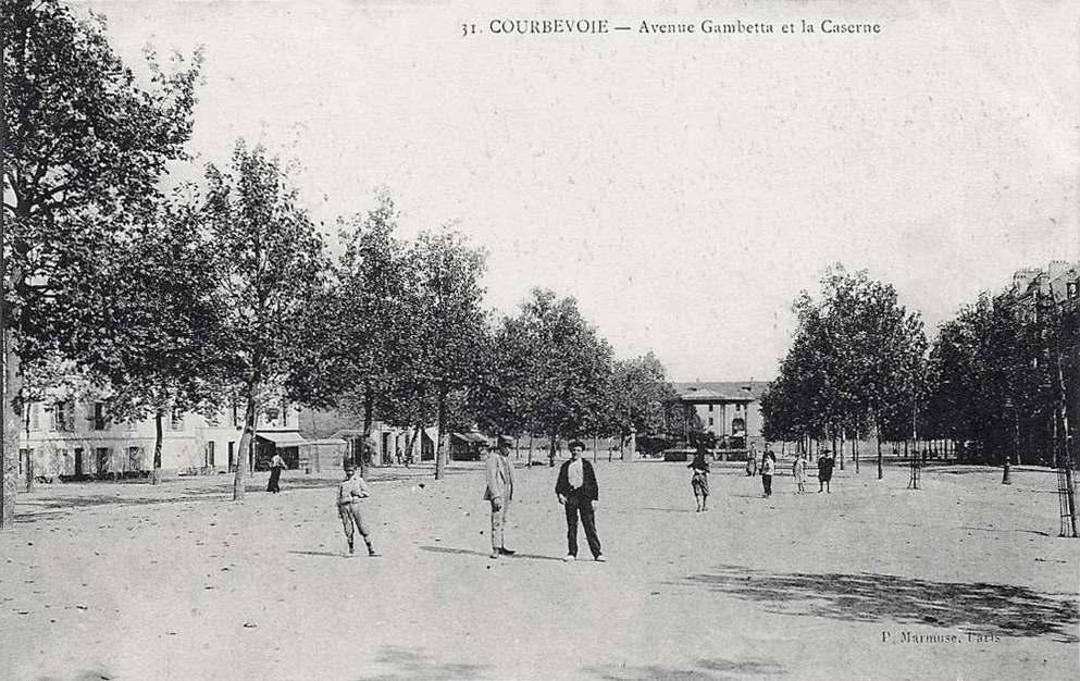 Carte postale ancienne. 31. Courveboie, Avenue Gambetta et la Caserne, ca. 1900.Courbevoie